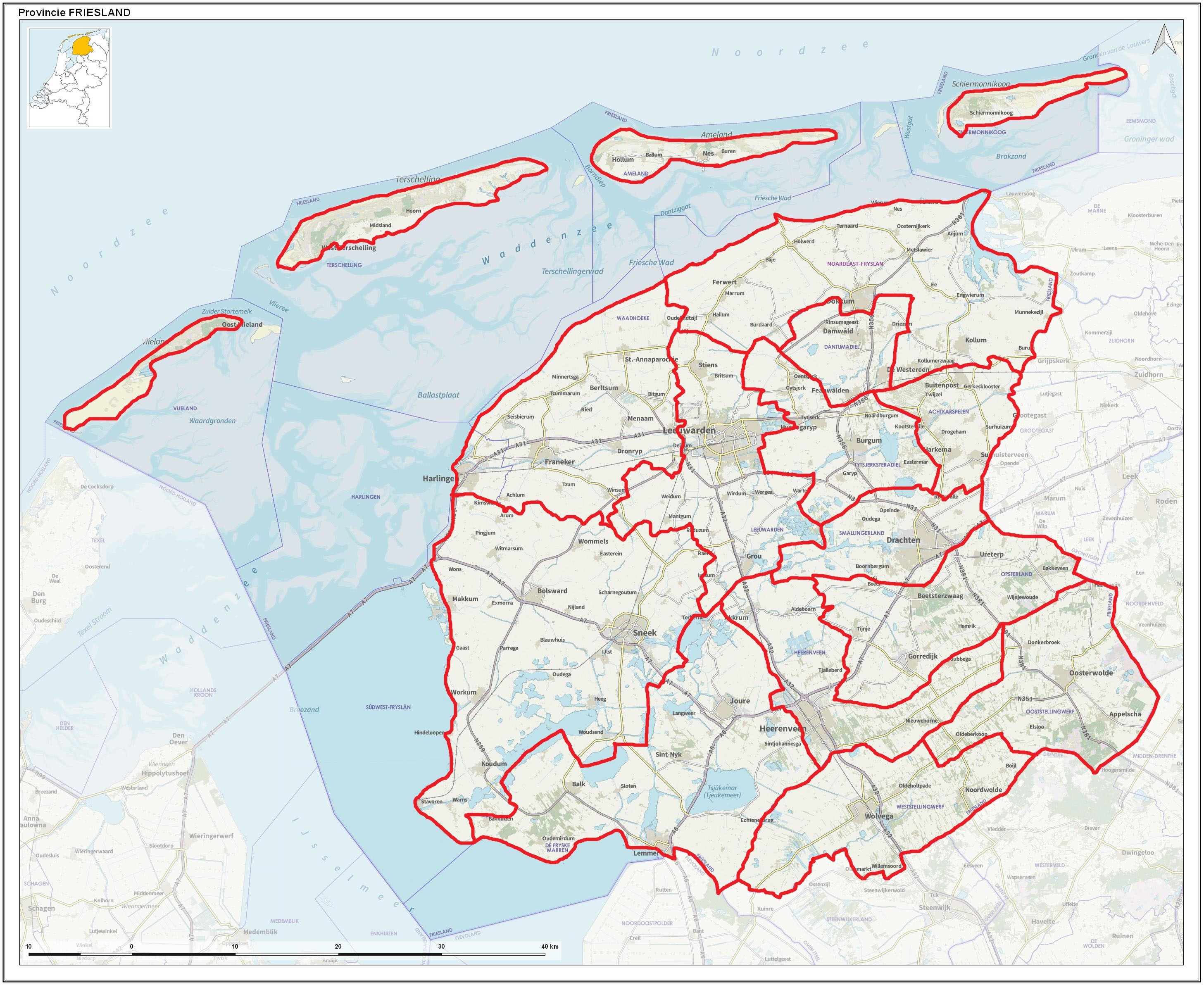 Friesland gemeenten 1-1-2019